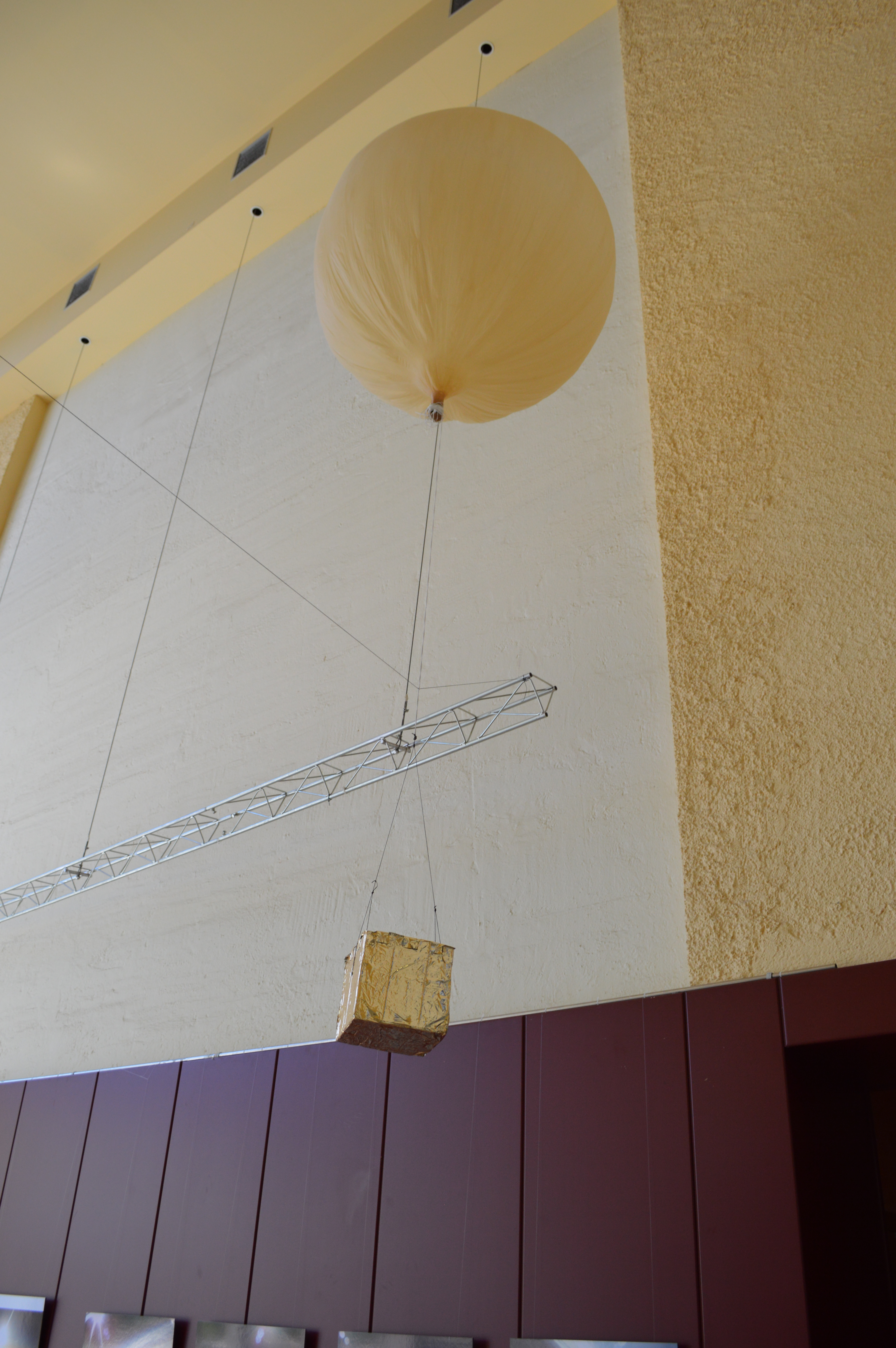 Globus atmosfèric de l'equip NESLAB exposat a l'entrada de l'Escola Tècnica Superior d'Enginyeria Industrial i Aeronàutica de la UPC. El NESLAB és un projecte associat a EUROAVIA i que compte amb el suport del programa INSPIRE 3.